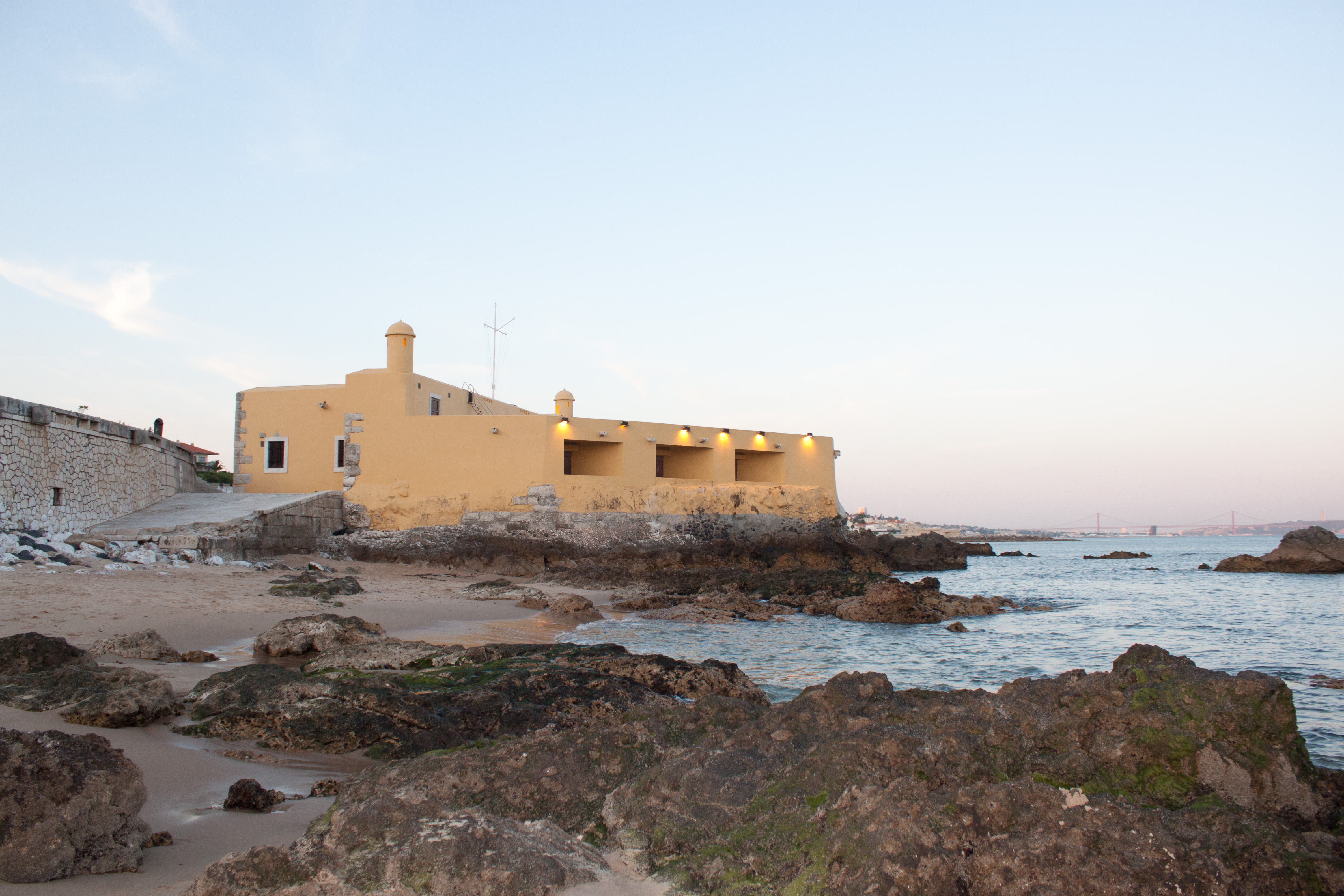 Forte da Giribita